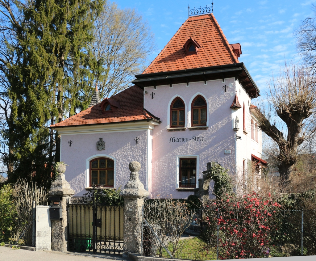 Villa Marienstein an der Lieferinger Hauptstraße im Salzburger Stadtteil Liefering.